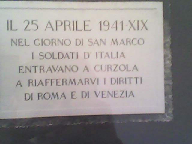 talijanski fašistički proglas na Korčuli u Drugom svjetskom ratu